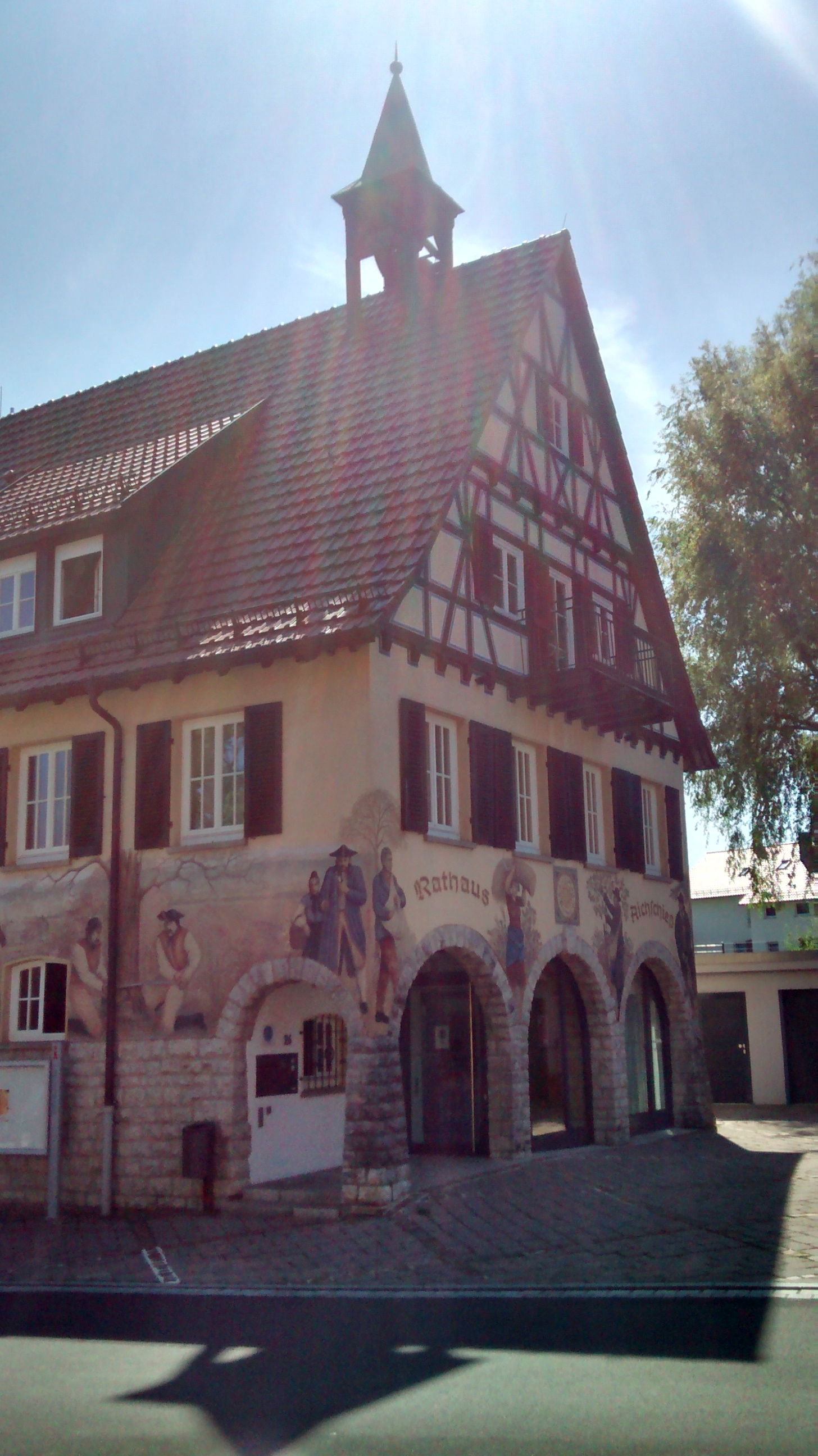 Ehemaliges Rathaus in Aichwald-Aichschieß. Es wurde 2016 aufwendig saniert.